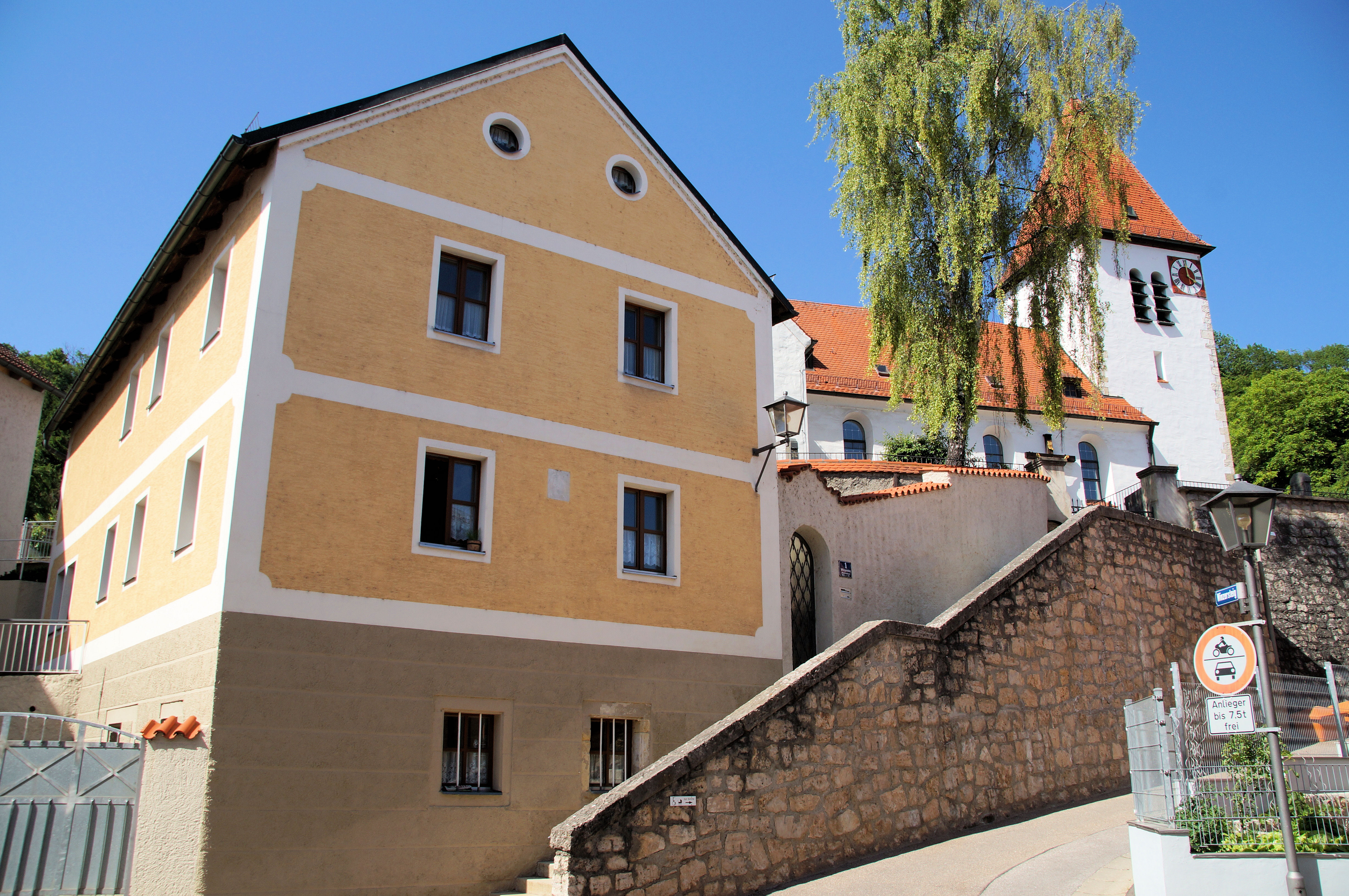 Ehemalige Mühle, heute Wohnhaus, dreigeschossiger und giebelständiger Satteldachbau, in der Substanz wohl gotisch, modern umgebaut; Steintafel mit Mühlrad, bezeichnet mit 1902 This is a photograph of an architectural monument.